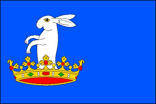 Vlajka města Libochovice